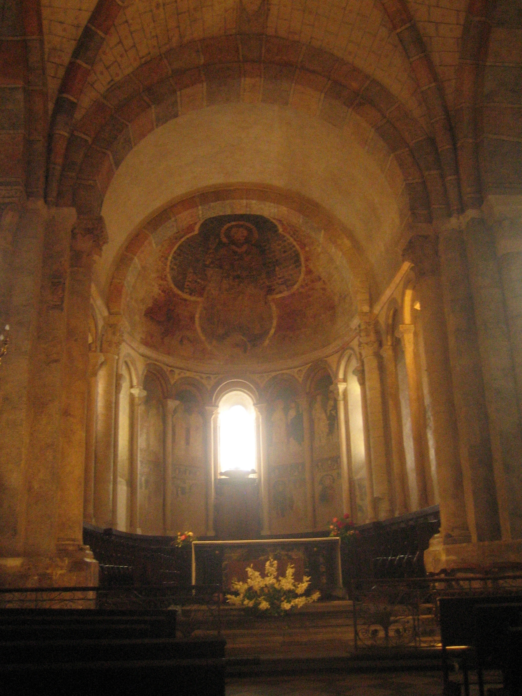 Cathedrale Saint-Lizier à Saint-Lizier (Ariège, France)